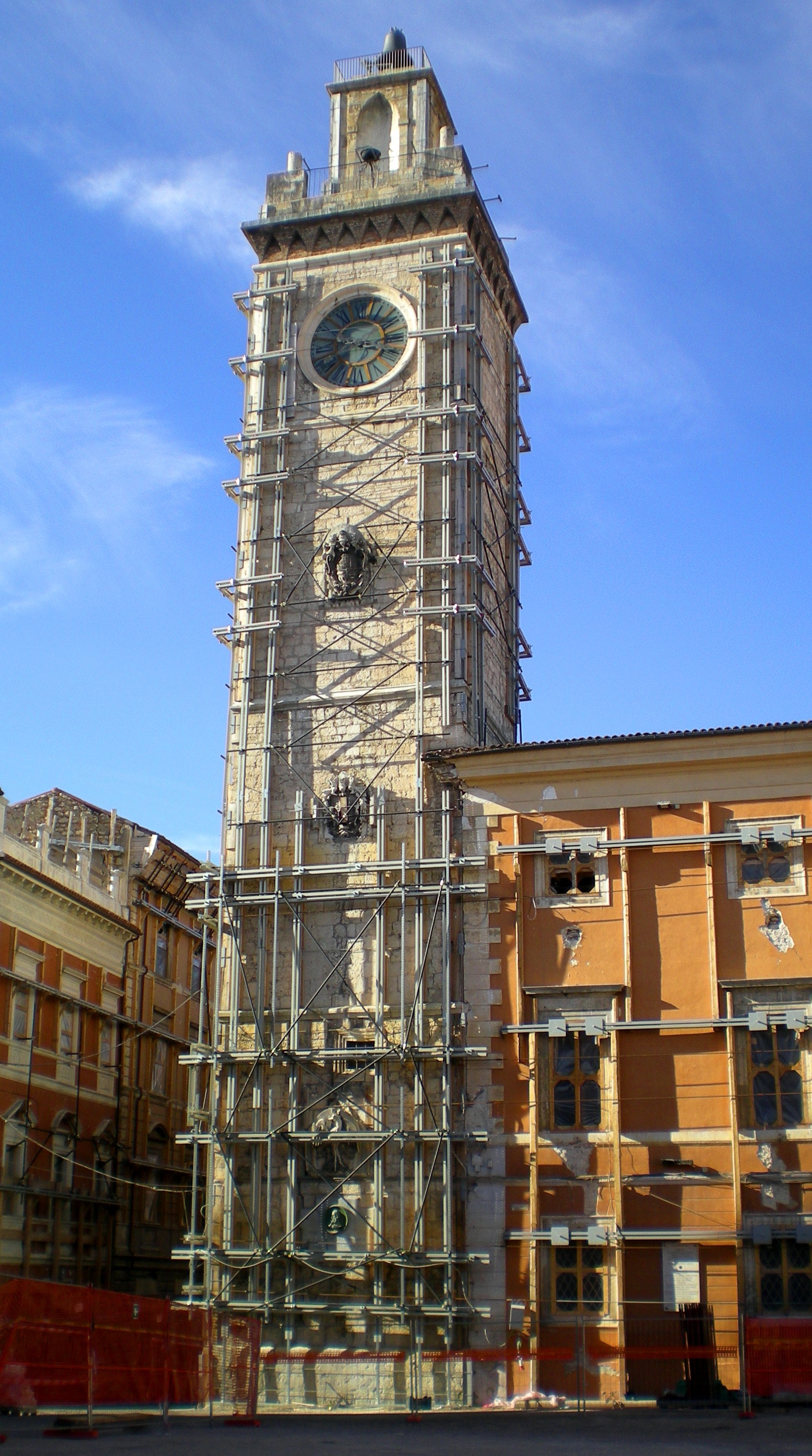 Torre civica (L'Aquila, Piazza Palazzo) dopo il terremoto del 2009